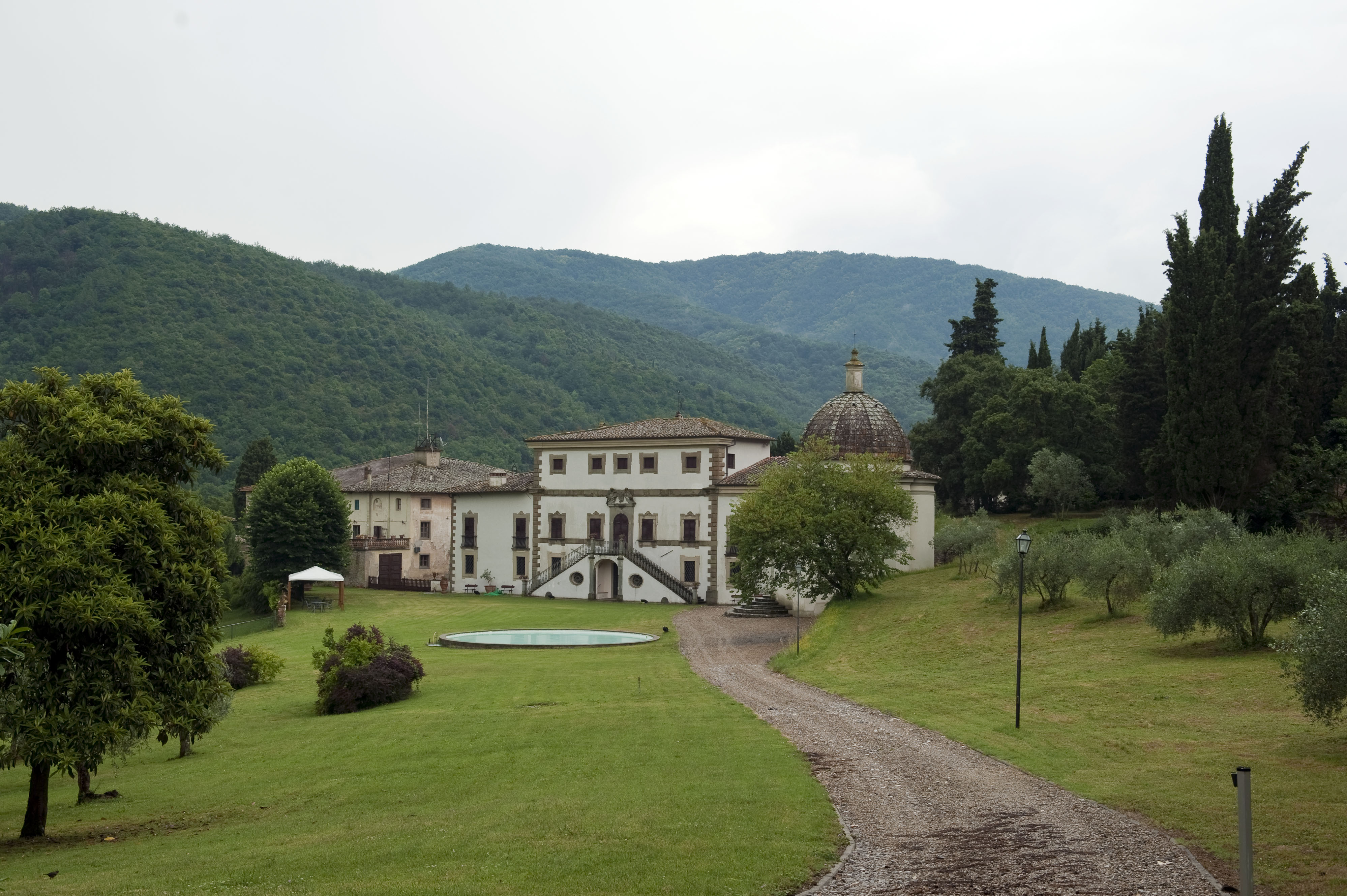 Villa di Cintoia, Greve in Chianti